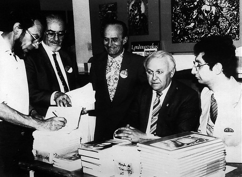 Verkistoj en Antverpeno en 1982 dum UK: de maldekstre Georges Lagrange, Tibor Sekelj, Aldo de' Giorgi, William Auld kaj eldonisto Bruĉjo Casini.